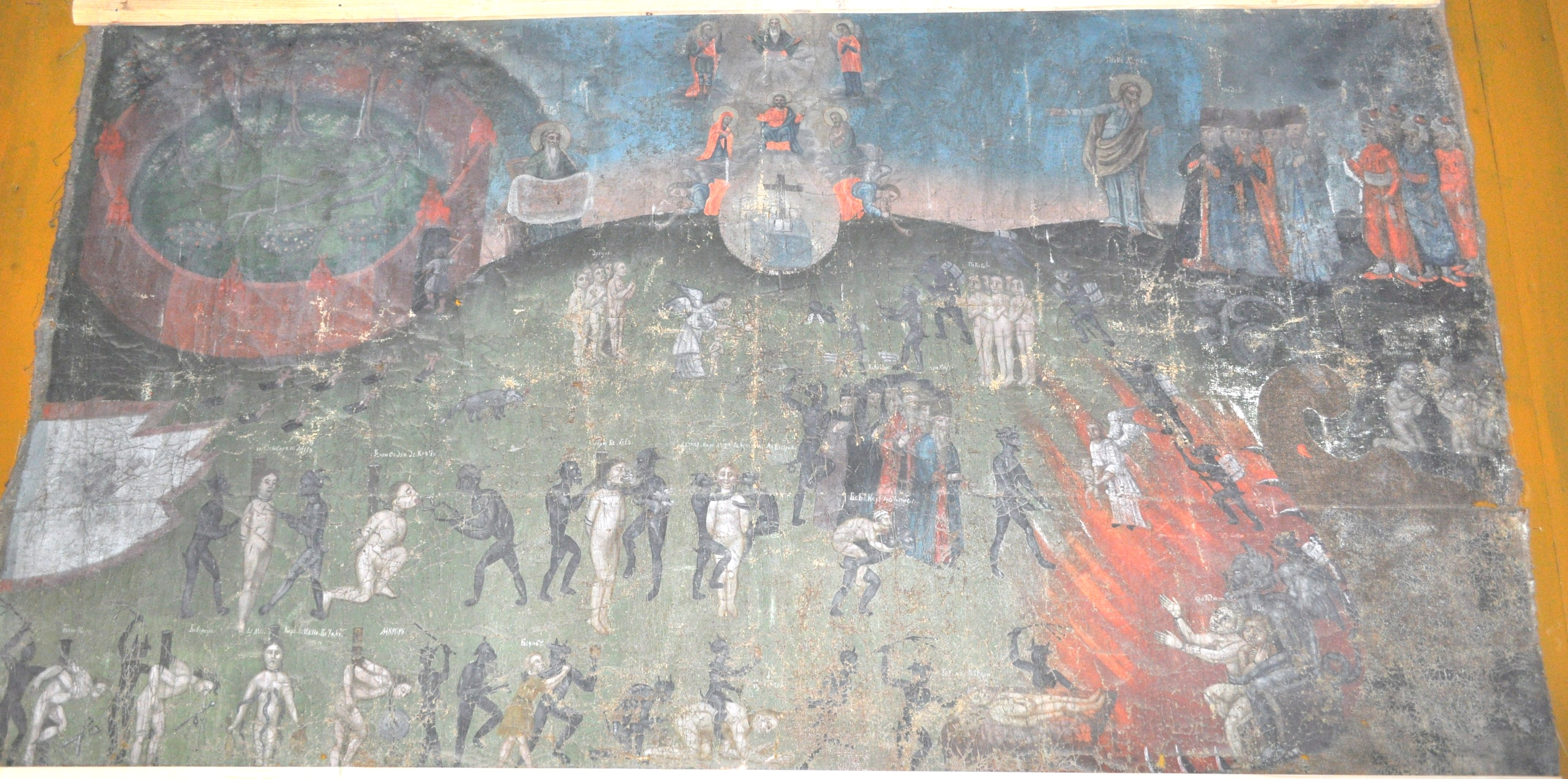 Biserica de lemn „Cuvioasa Paraschiva” din satul Valea Sării, județul Vrancea